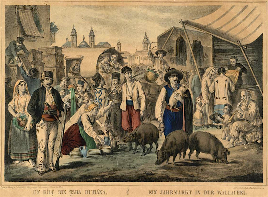 Un bîlç din Țara Rumâna - Ein Jahrmarcht in der Walachei